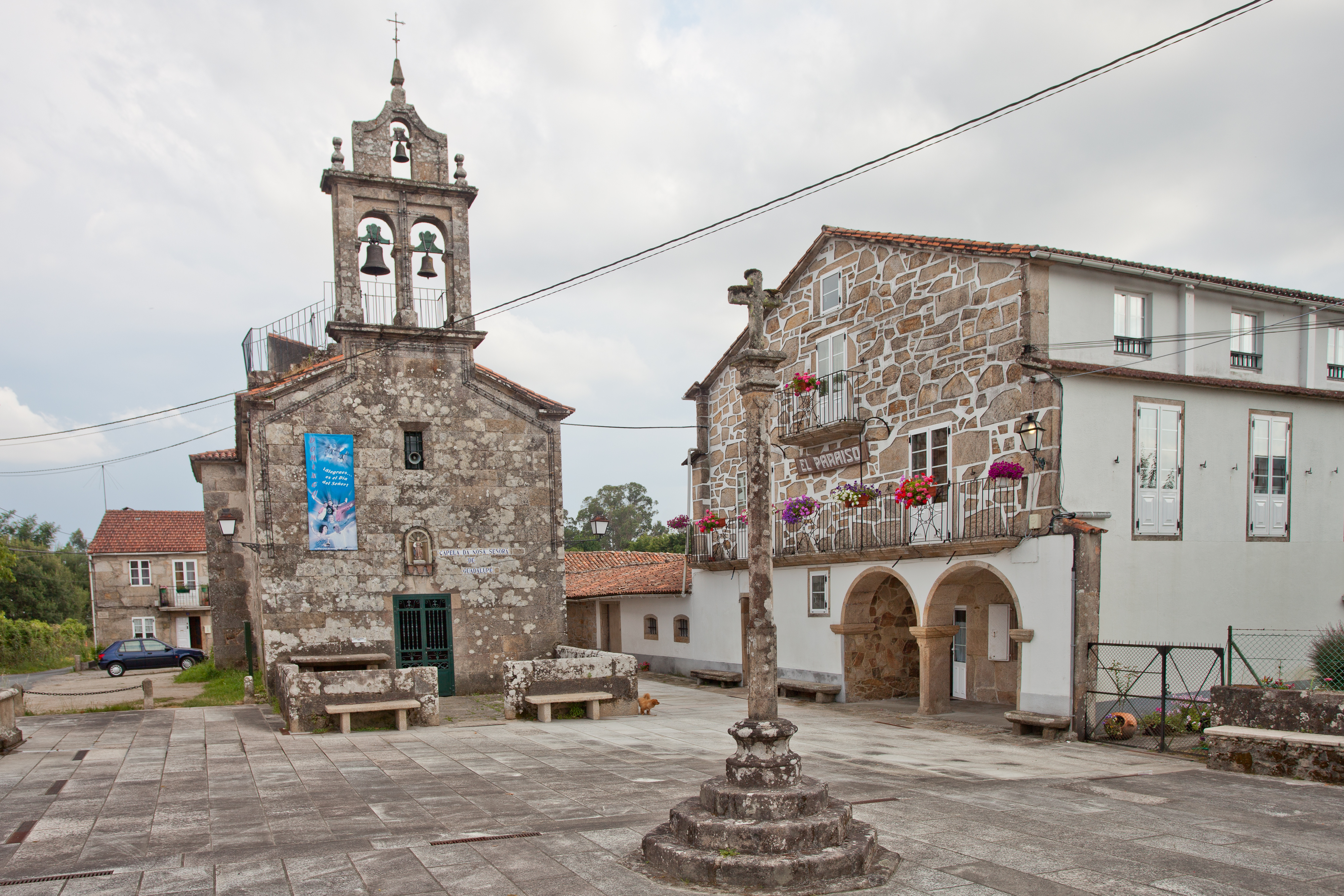 Tremo, Os Ánxeles, Brión.